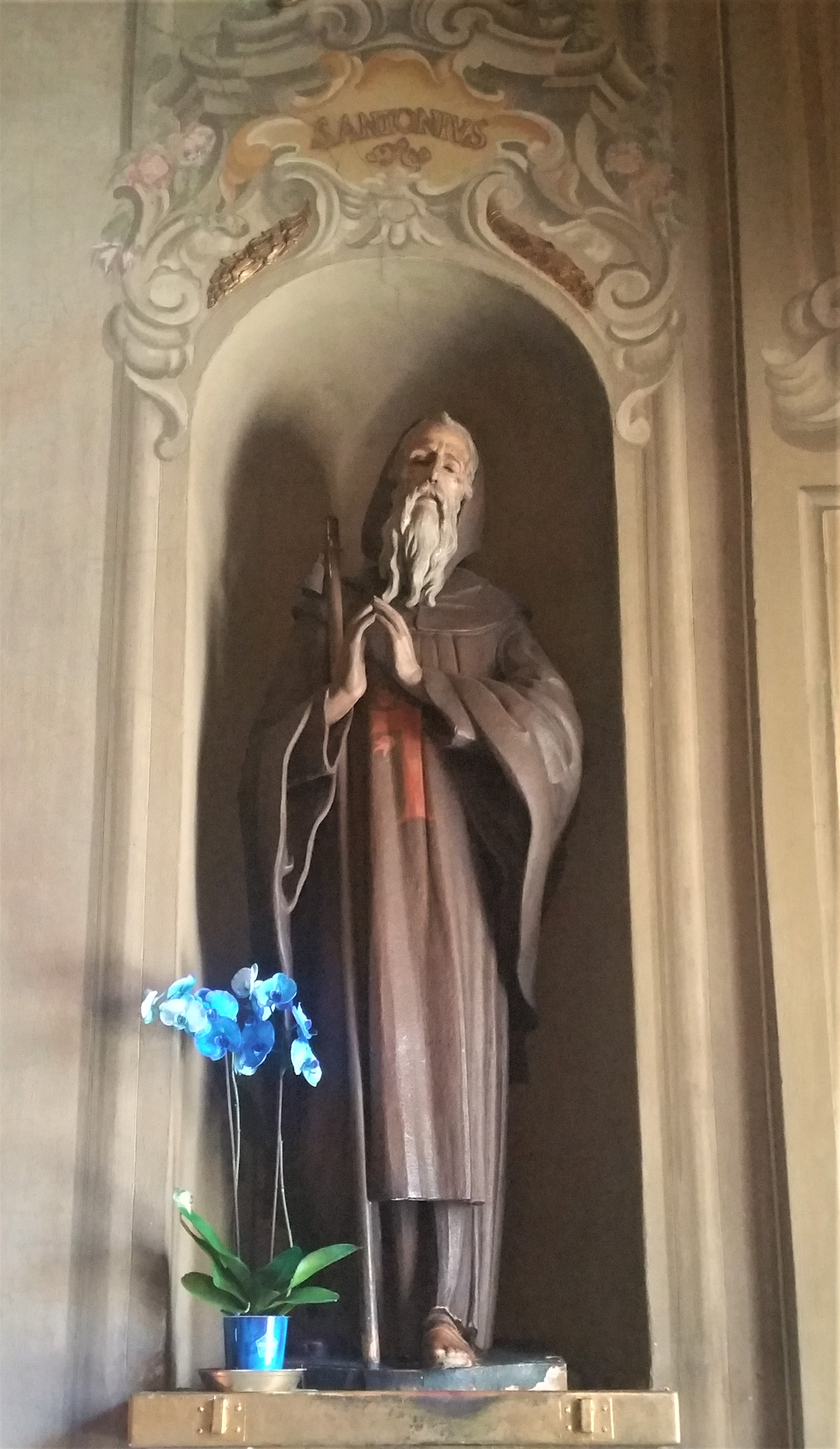 statua dedicata a sant'Antonio abate